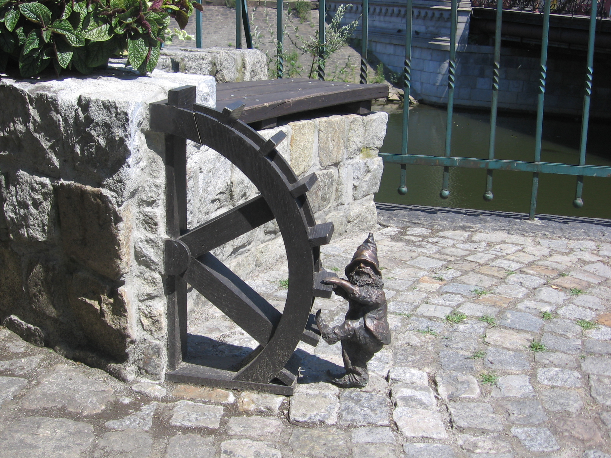 Krasnal Młynarz w letnim ogródku Karczmy Młyńskiej we Wrocławiu; w tle Odra i jeden z mostów Młyńskich